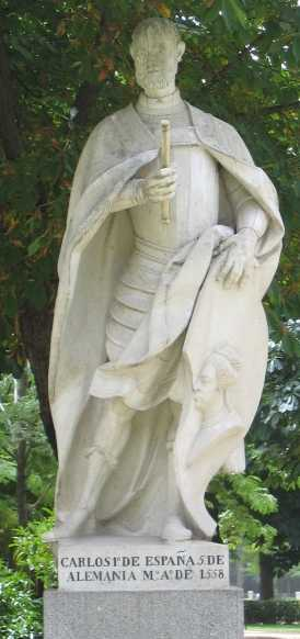 Estatua de Carlos I de España en los Jardines del Buen Retiro de Madrid (España). Esculpida en piedra blanca por Juan Pascual de Mena (1707–1784) entre 1750 y 1753.